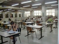 Interior da Biblioteca Florestan Fernandes. Sala de leitura.